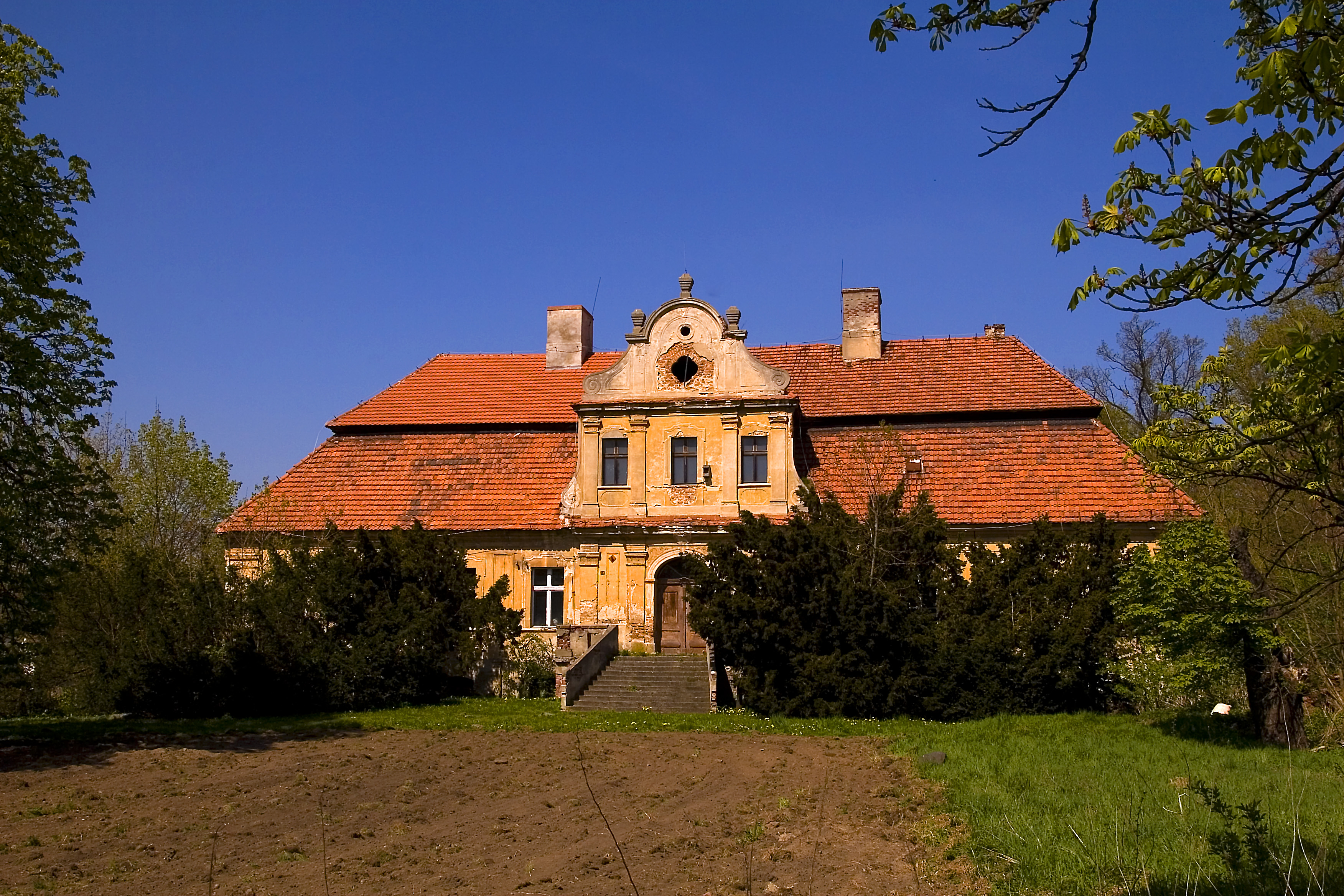 Mikolin - dwór (zabytek nr 178/55 z 15.10.1955)